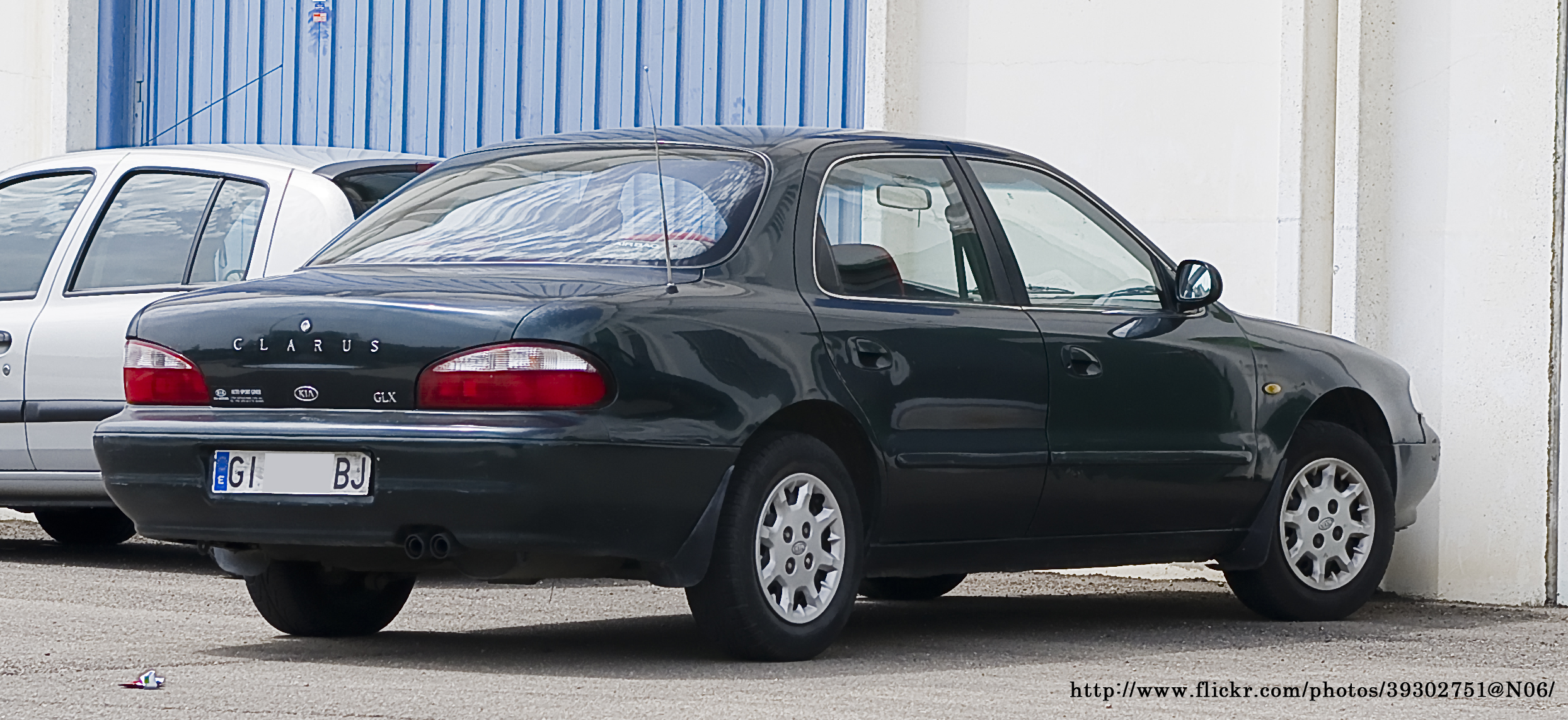 1998 Kia Clarus GLX